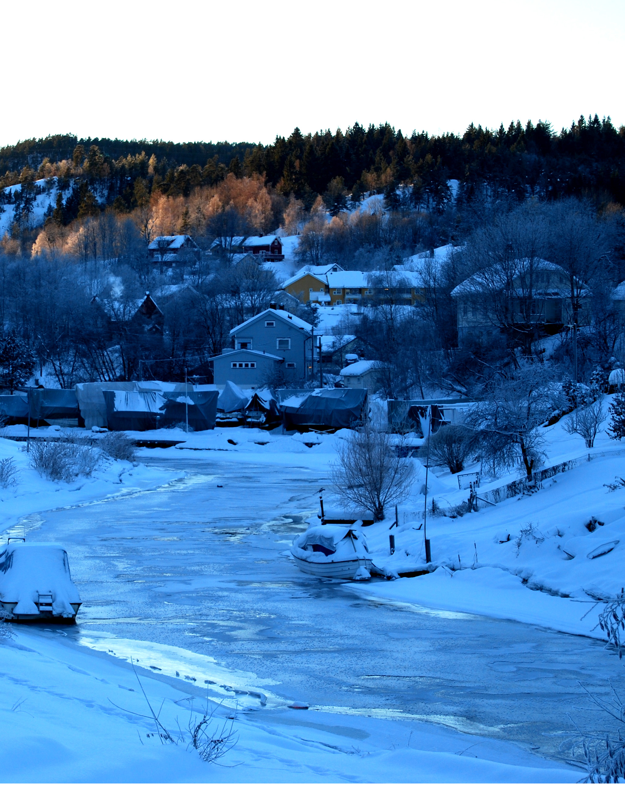 Herrevassdraget i Bamble og Skien i Telemark.